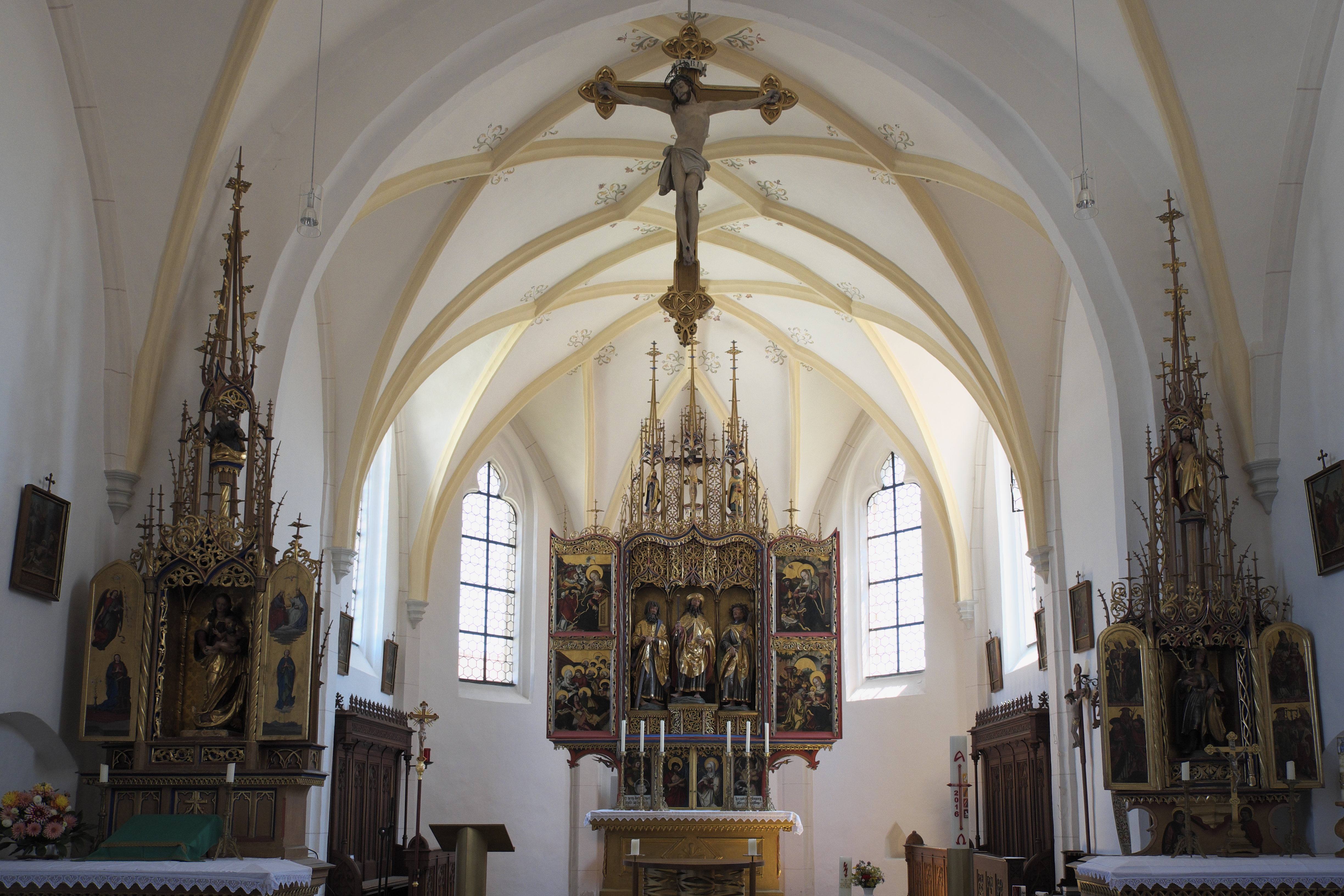 Katholische Filialkirche St. Jakobus der Ältere in Rabenden, einem Ortsteil von Altenmarkt an der Alz im Landkreis Traunstein (Bayern/Deutschland), Altar des Meisters von Rabenden, spätgotischer Flügelaltar